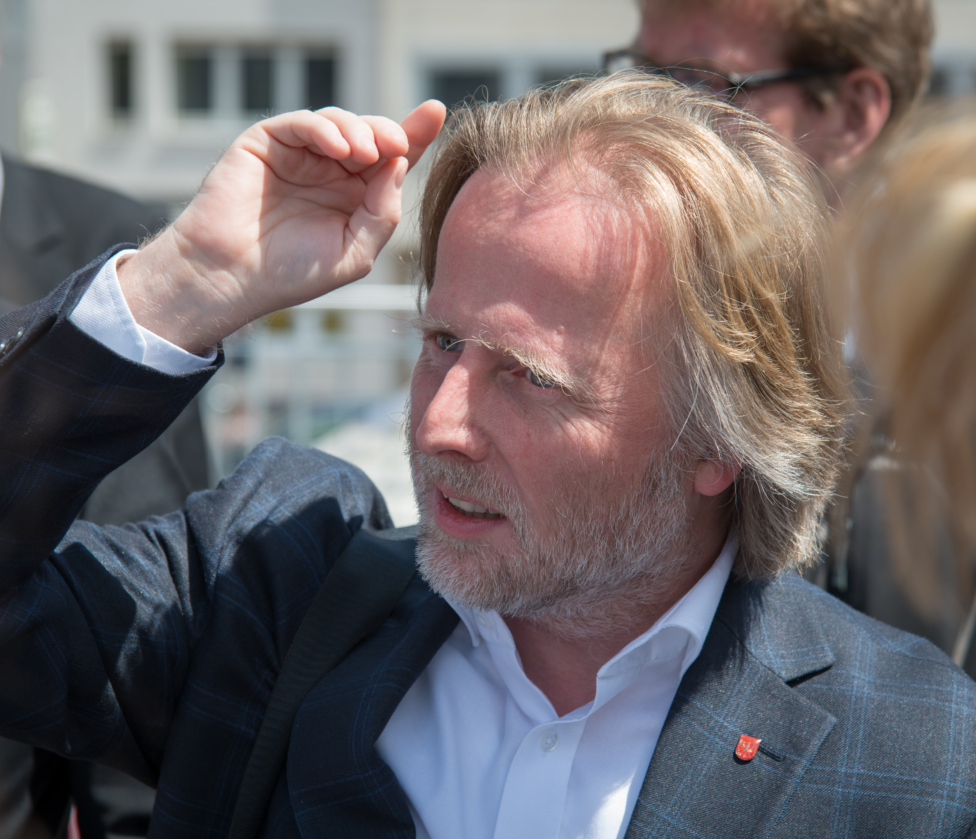 Olaf Cunitz auf einer Presseveranstaltung in Frankfurt am Main (Mai 2015)